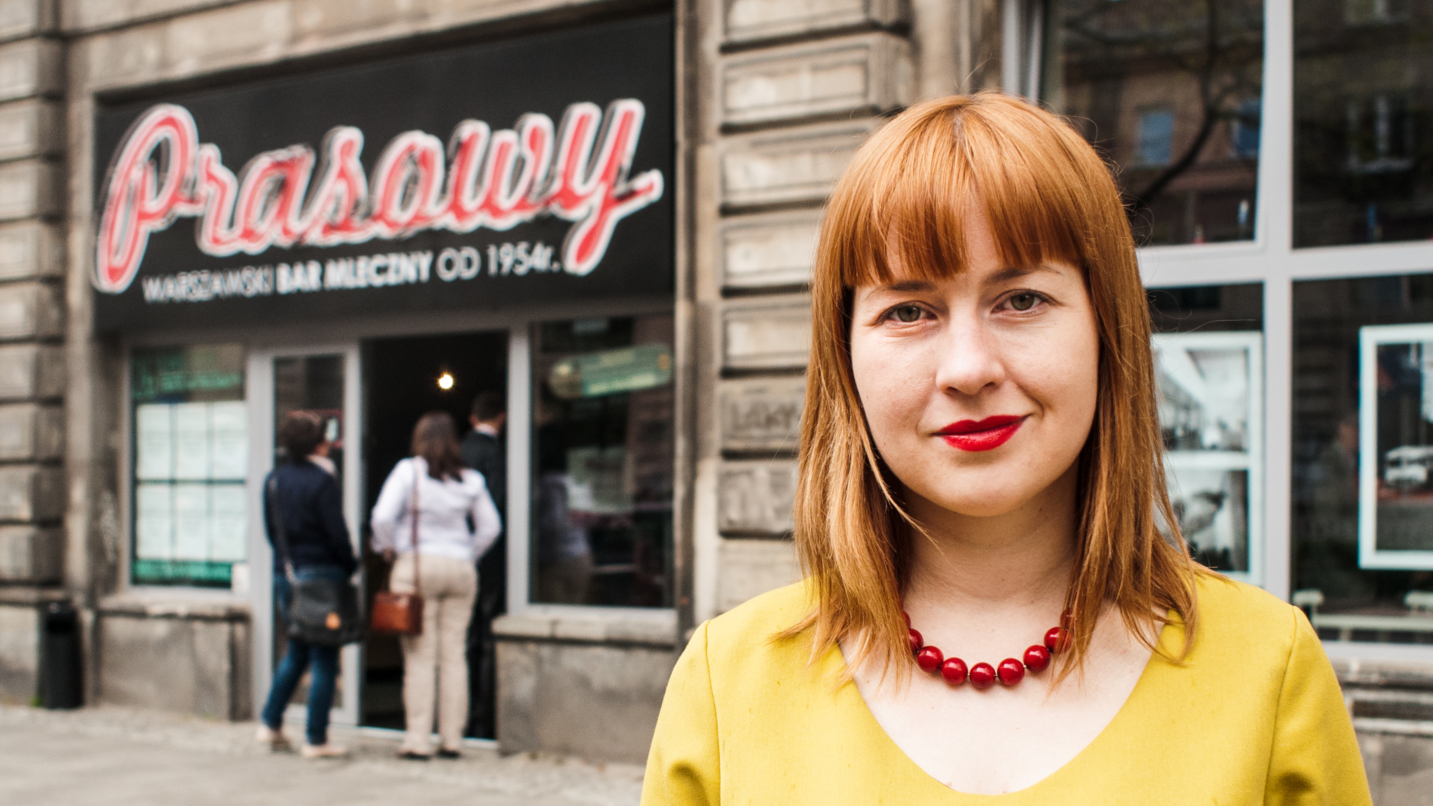 Joanna Erbel - warszawska aktywistka miejska